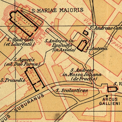 Pianta di Hülsen